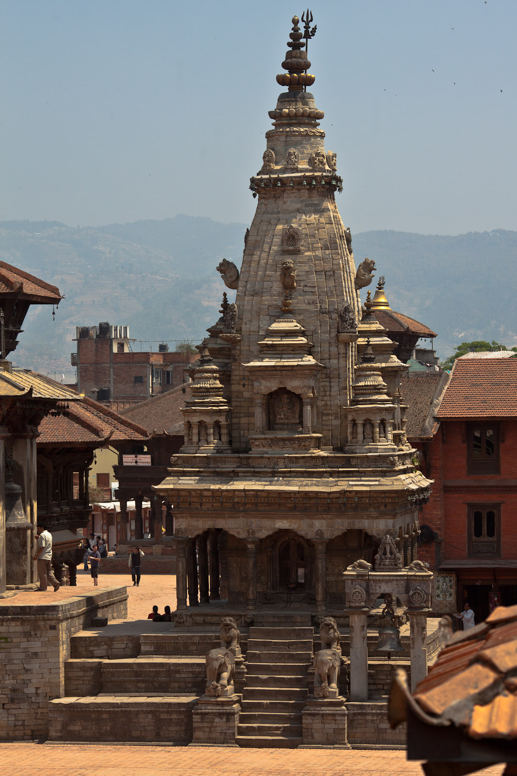 Bhaktapur